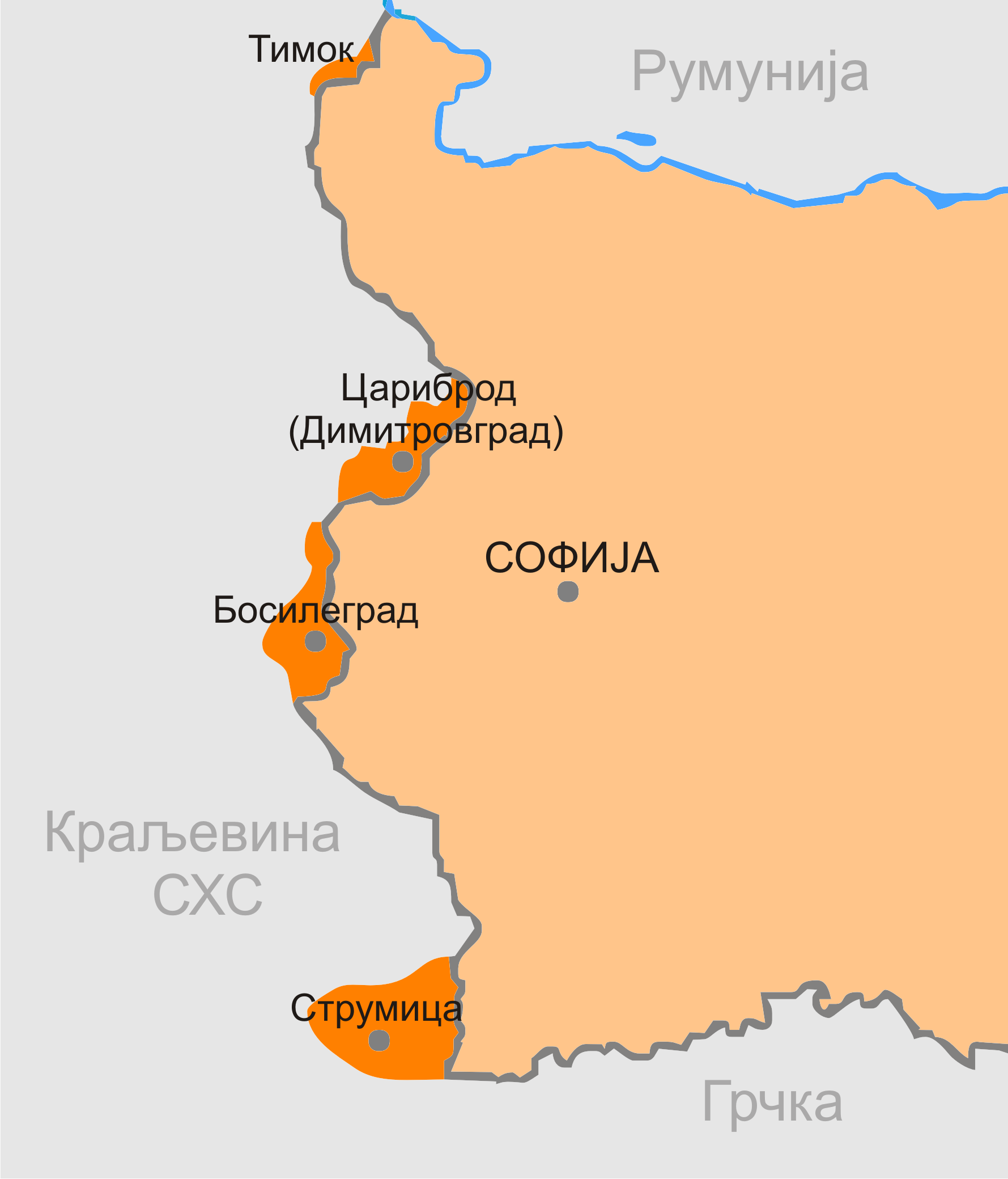 Западне бугарске покрајине